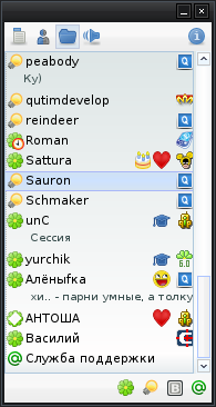 qutIM 0.2 alpha